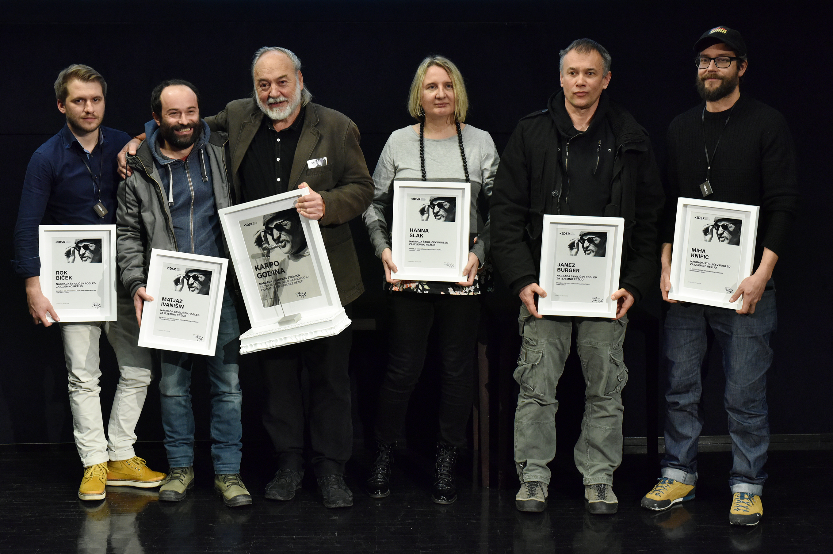 Štigličeve nagrade 2018.